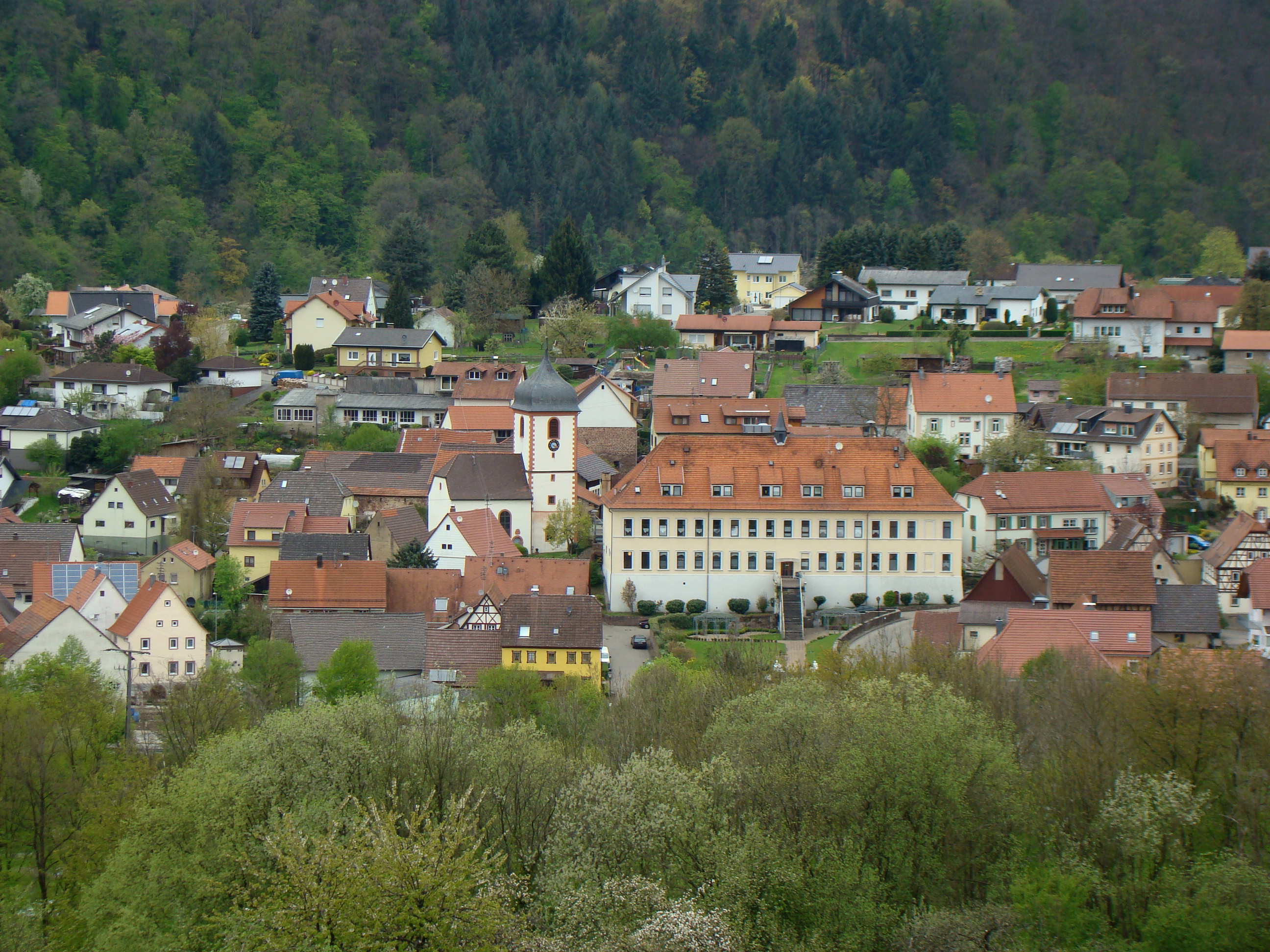 Blick von Mörtelstein auf die Ortsmitte von Binau